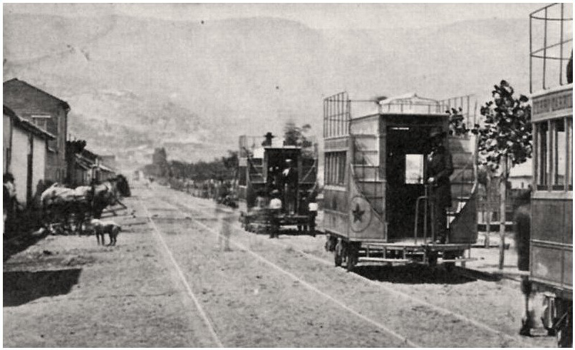 Primeros tranvías de Valparaíso. Estos eran tirados por caballos, como si fueran carretas, pero sobre rieles. Fotógrafía de la década de 1860.